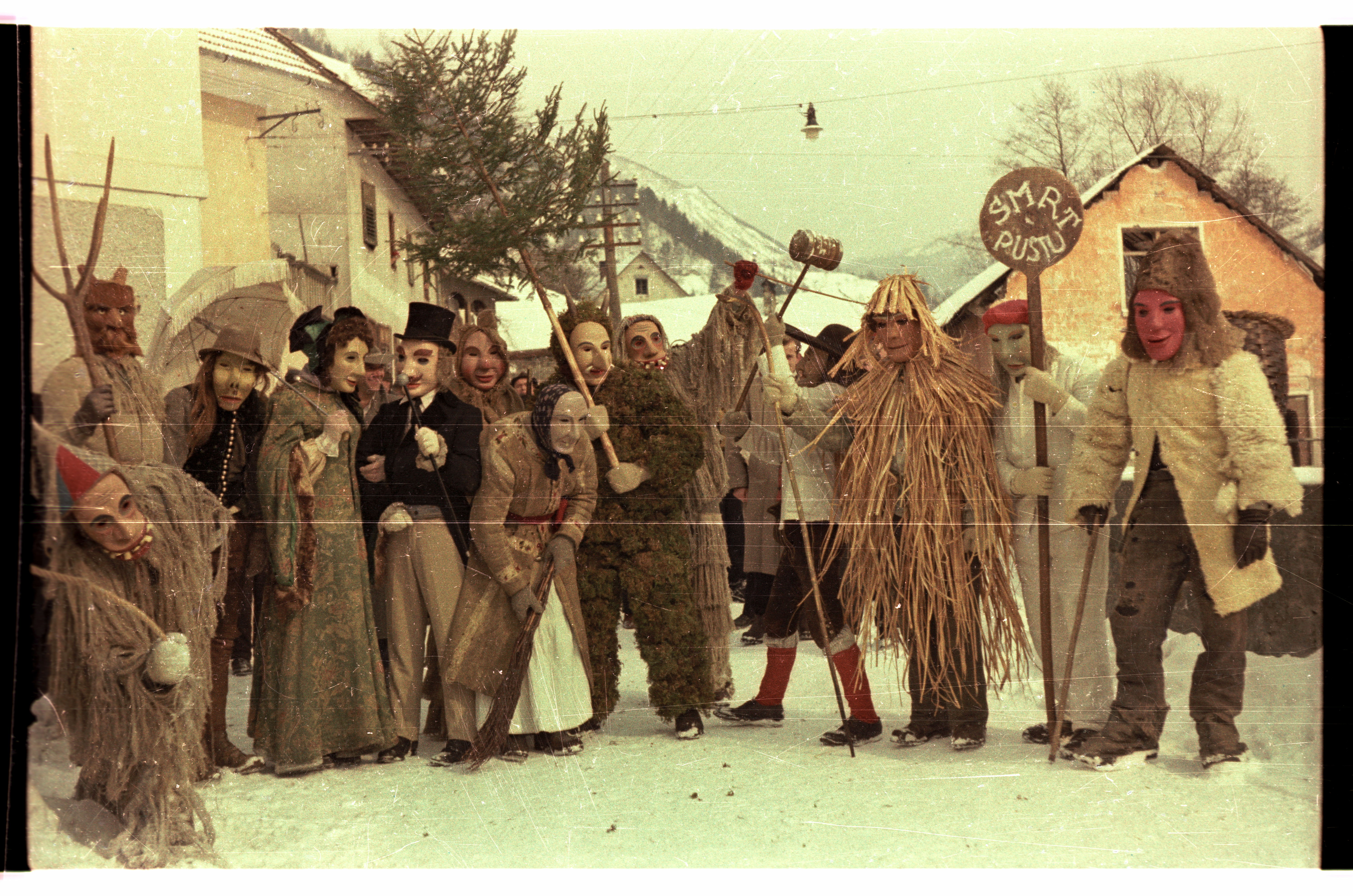 Cerkljanski laufarji 1956 - Ta tirjest, Lamant, ta hrastov, gospa, gospod, ta žaklast, ta stara, Pust, ta star, ta ličnatn, ta bev, ta kožuhast.